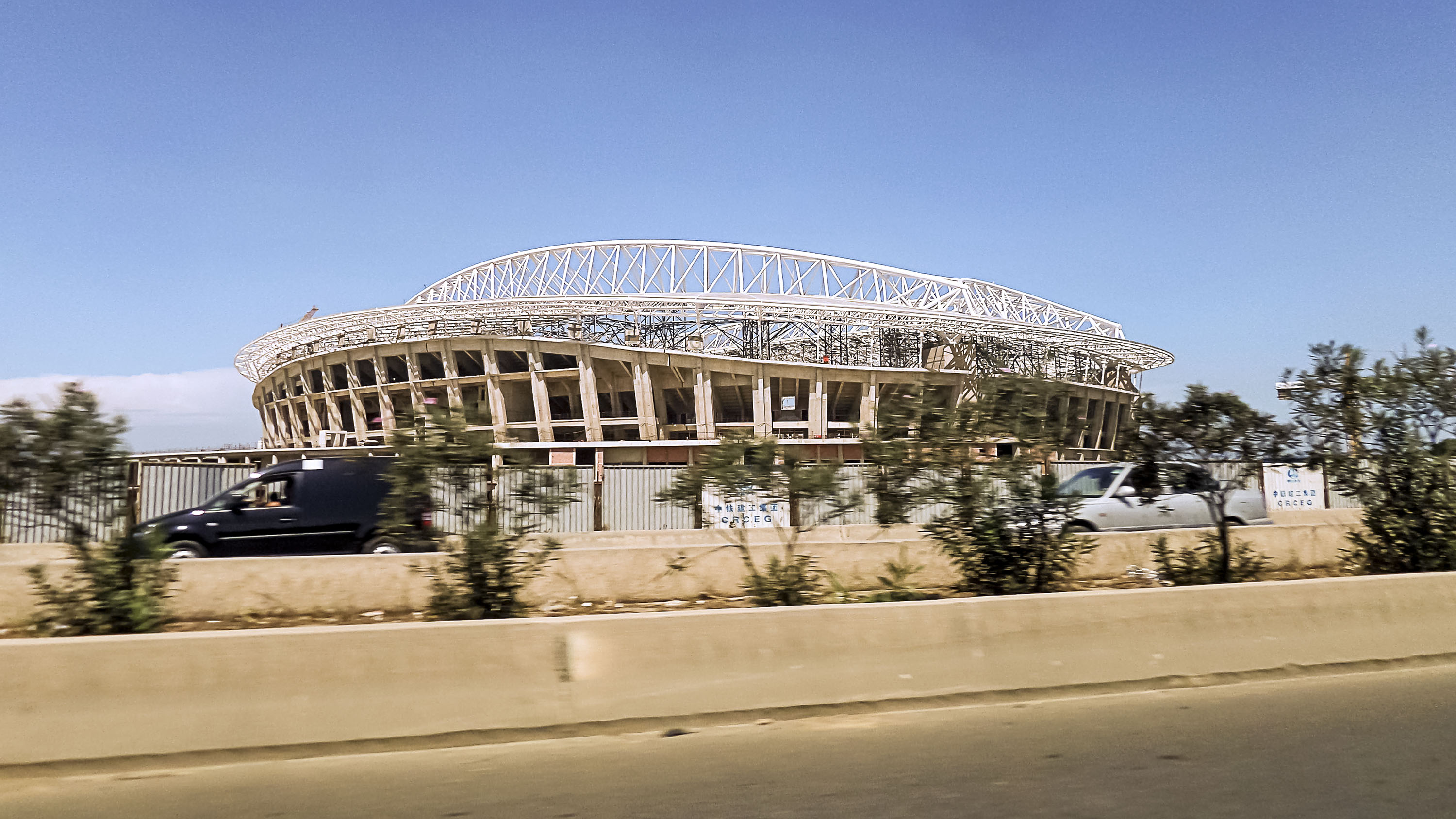 stade de Baraki, Alger ملعب براقي - الجزائر